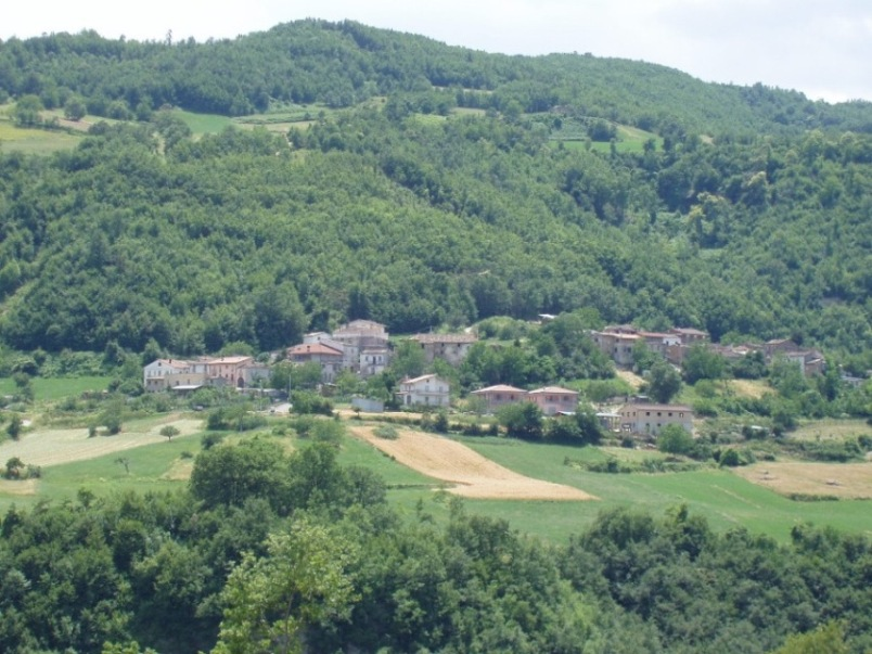 Foto di Faieto, Italia da Lucio De Marcellis da Teramo. L'autore rilascia nel pubblico dominio con la licenza GFDL.